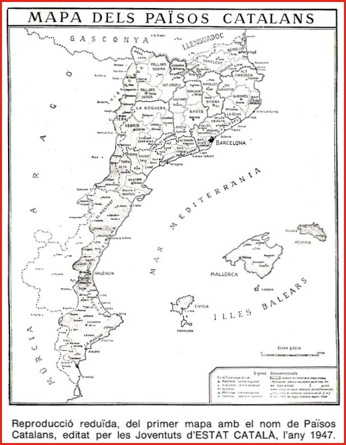 Mapa dels Països Catalans datada al 1947.